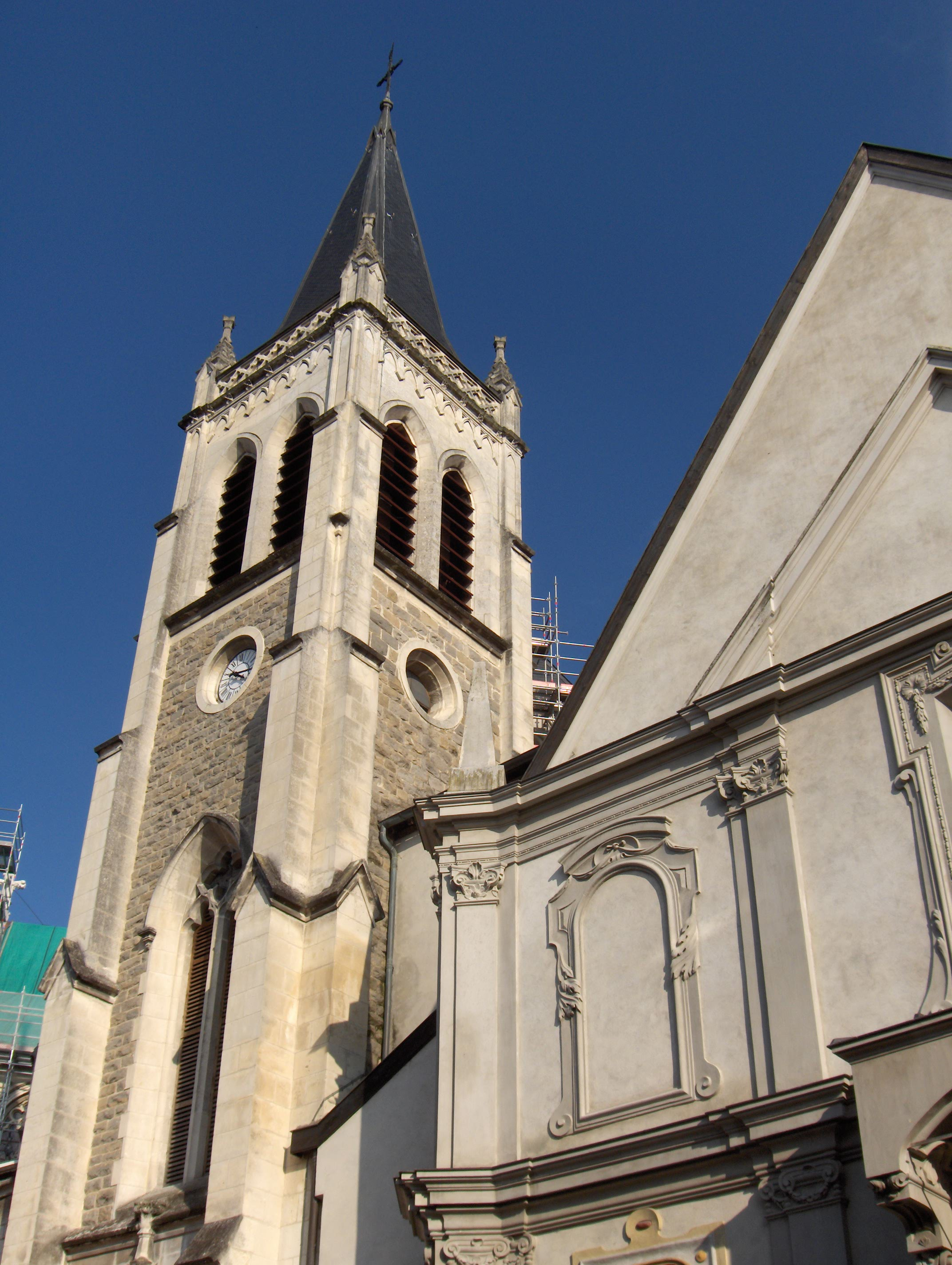 Détail du clocher de la Basilique Saint-François-de-Sales de Thonon-les-Bains.